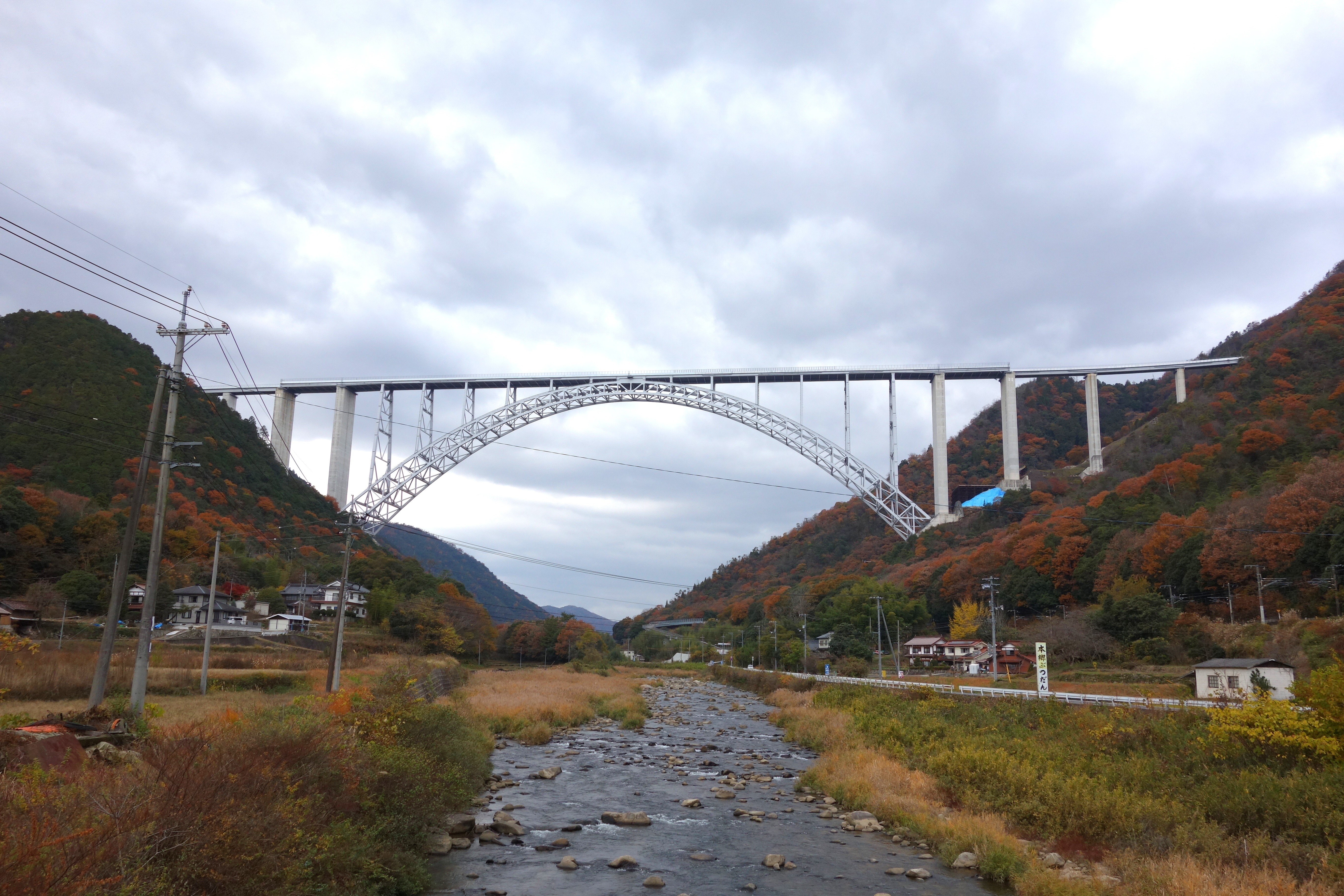 広島空港大橋 2012年12月撮影